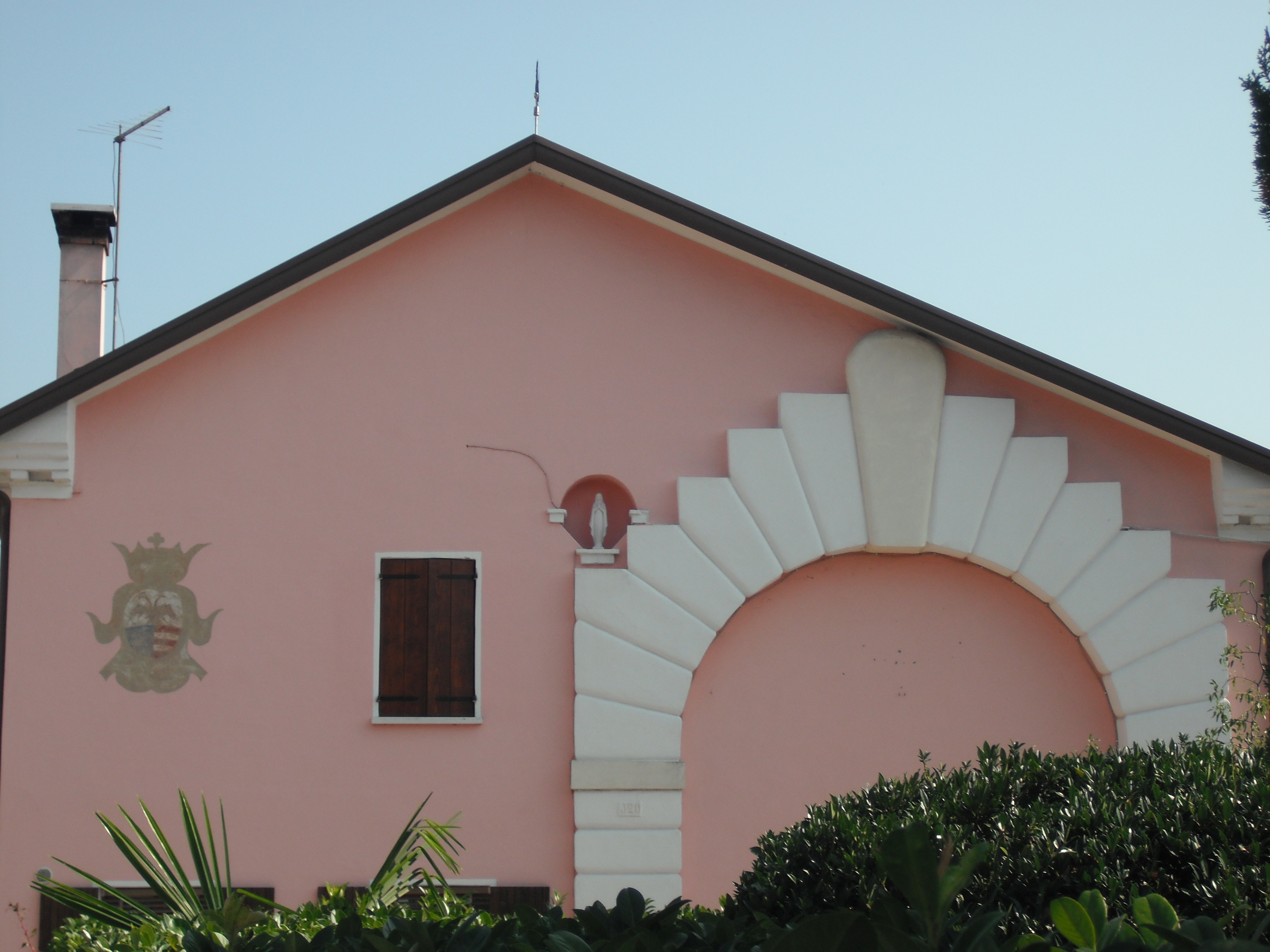 Casa Zanardo, Zerman.